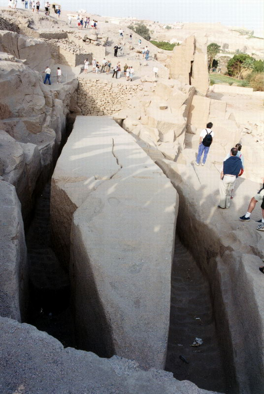 El obelisco inacabado, en la cantera de Asuán, Egipto.